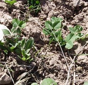 Image:Pesoleres_Pisum sativum25_març_2006_028.jpg